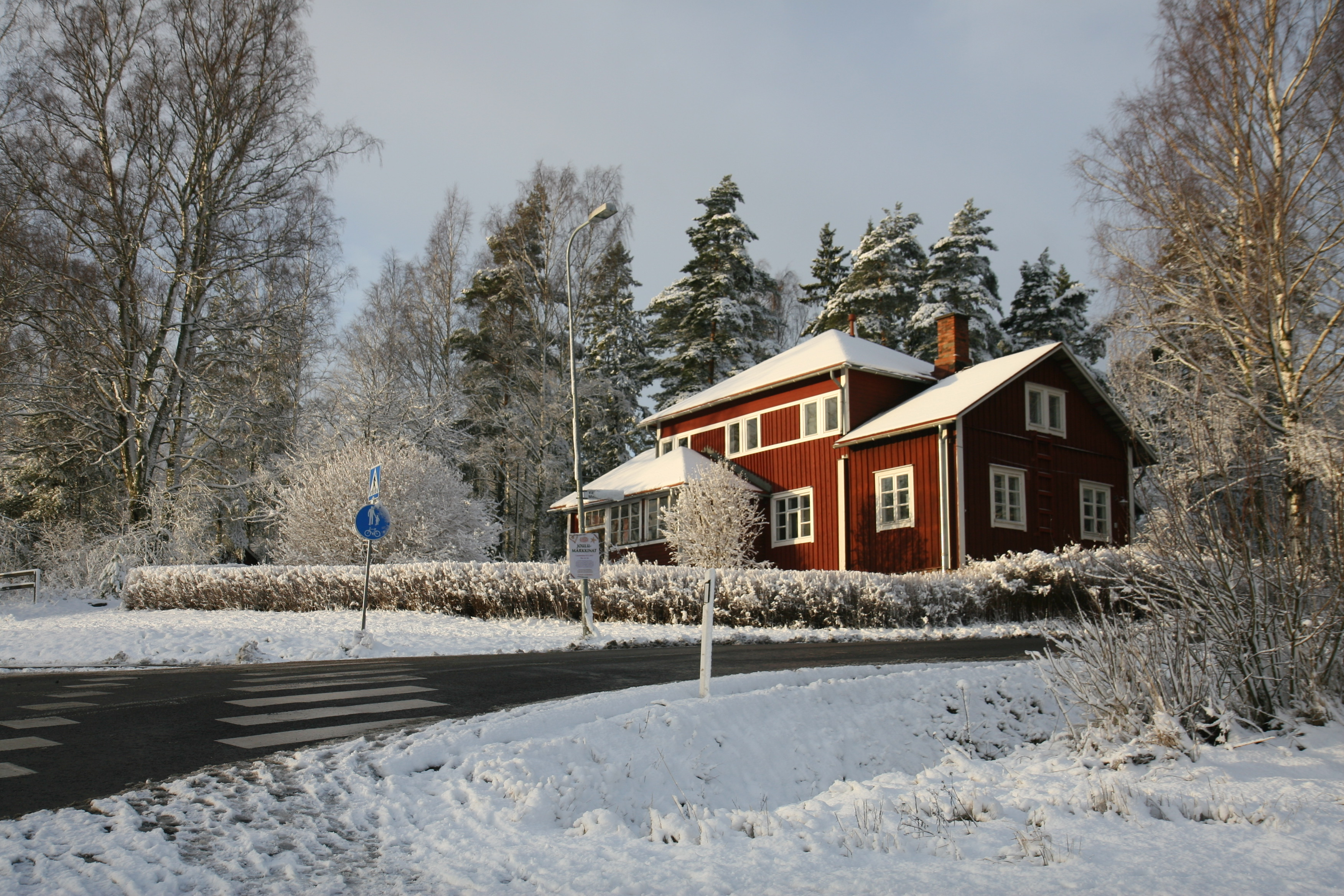 Talvinen kuva Henttaan punaisesta tuvasta